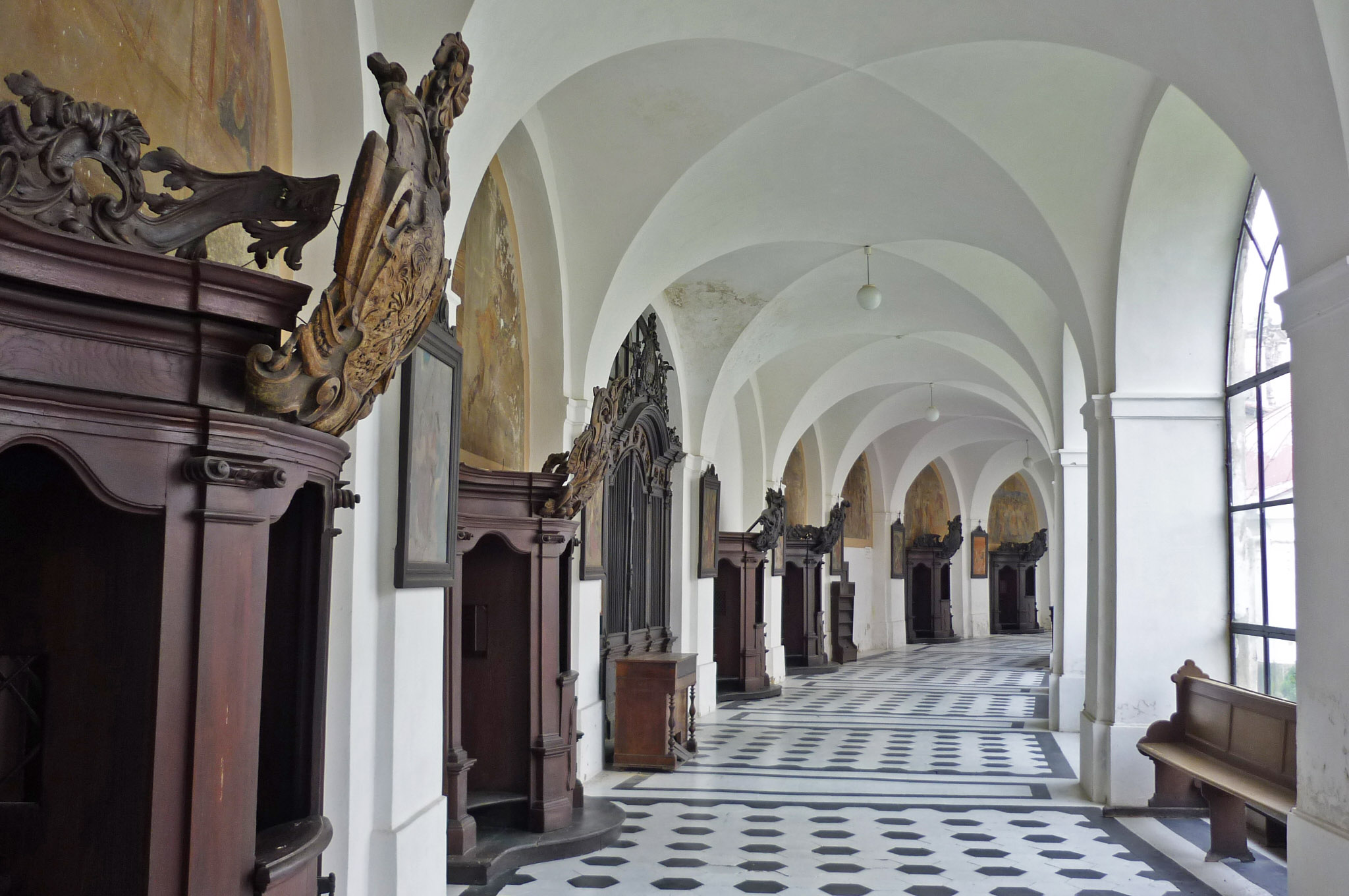 Prozessionsumgang an der Wallfahrtskirche Schmerzen Mariens in Mariaschein (Bohosudov) in Nordböhmen